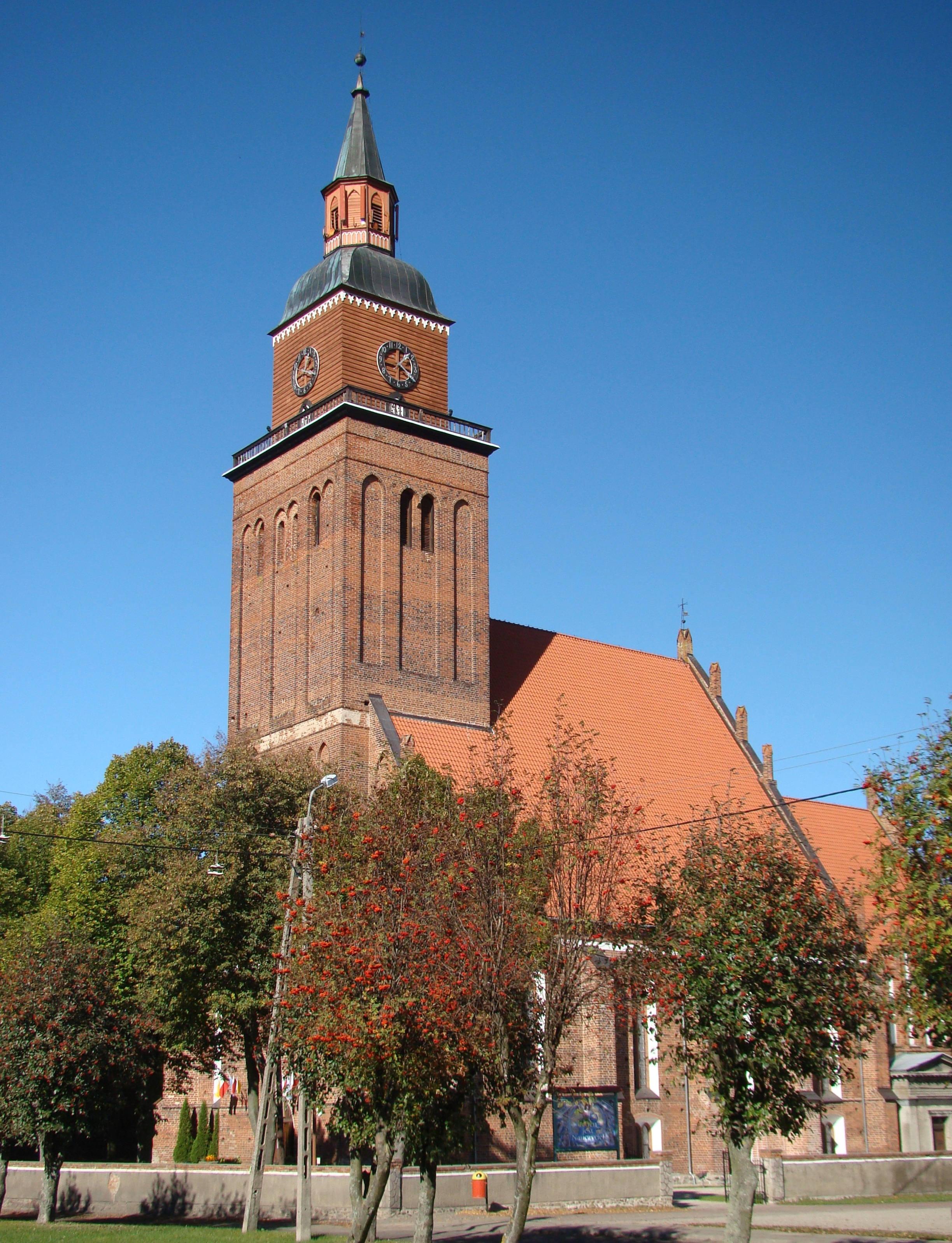 Sępopol - kościół parafialny p.w. św. Michała Archanioła (zabytek nr A-56 z 30.09.1949)